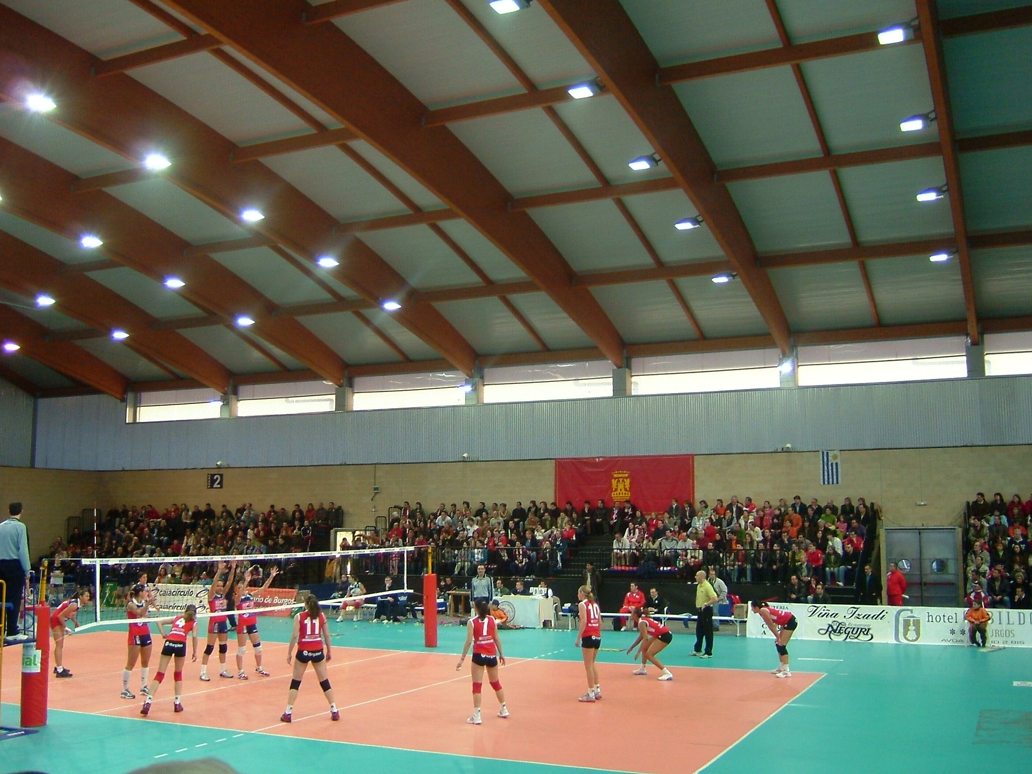 Club Volei Miranda